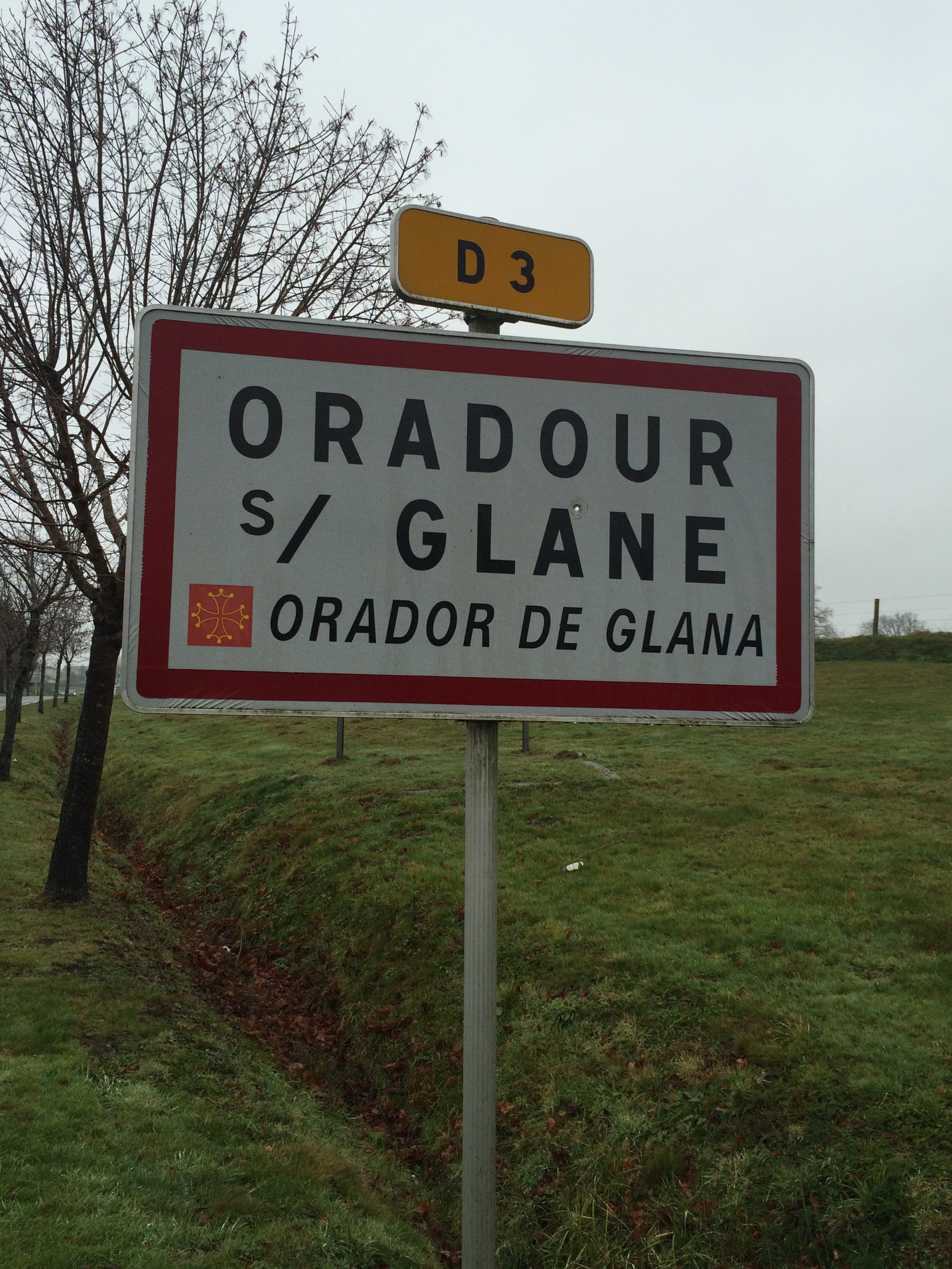 Panèl d'intrada d'Orador de Glana.